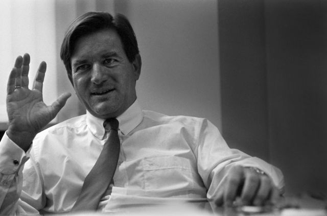 Thomas Haffa am 24. August 1999 in seinem Büro von EM.TV in Unterföhring